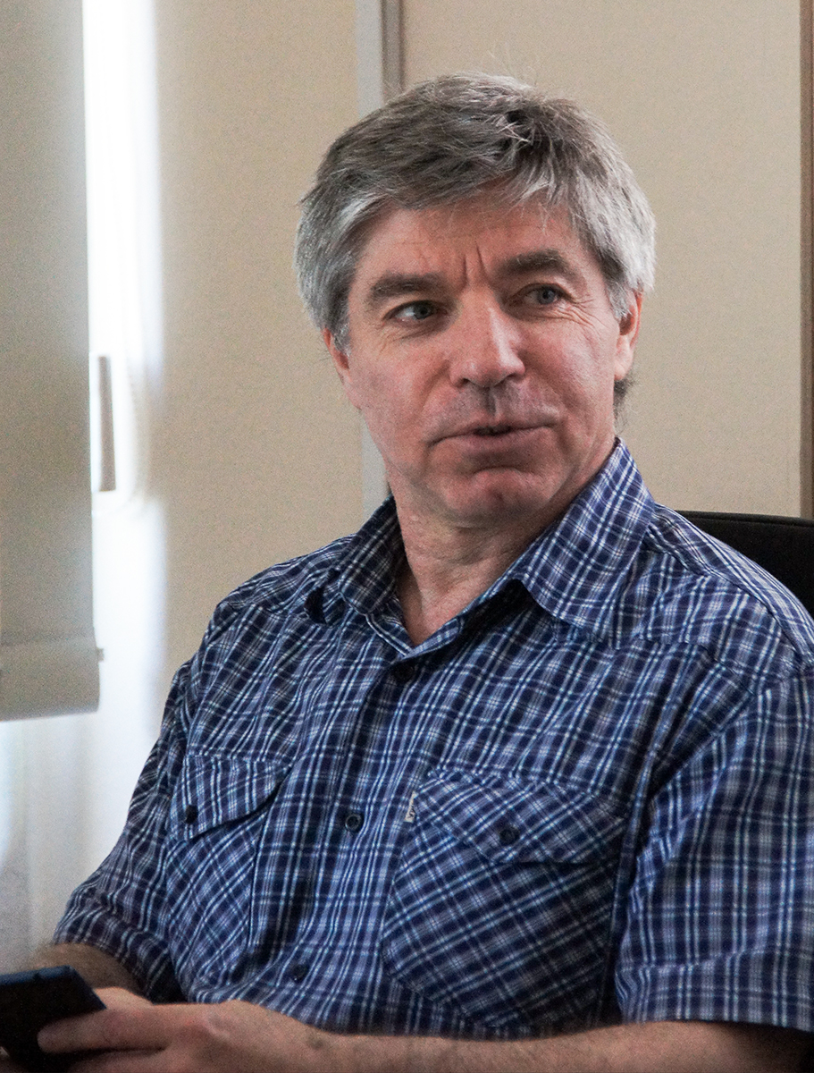 Портрет